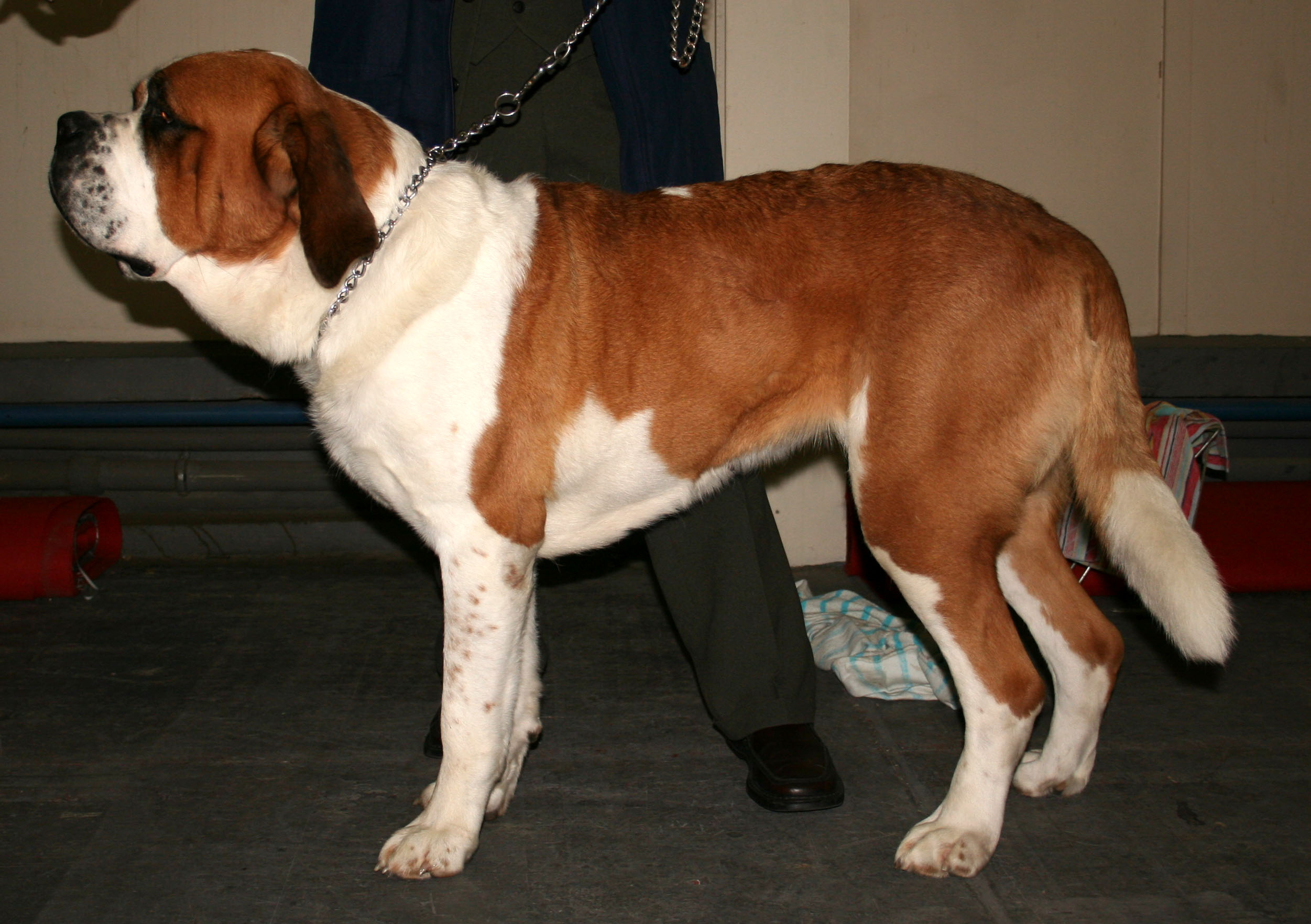 Bernardyn_krótkowłosy na Światowej Wystawie Psów Rasowych w Poznaniu